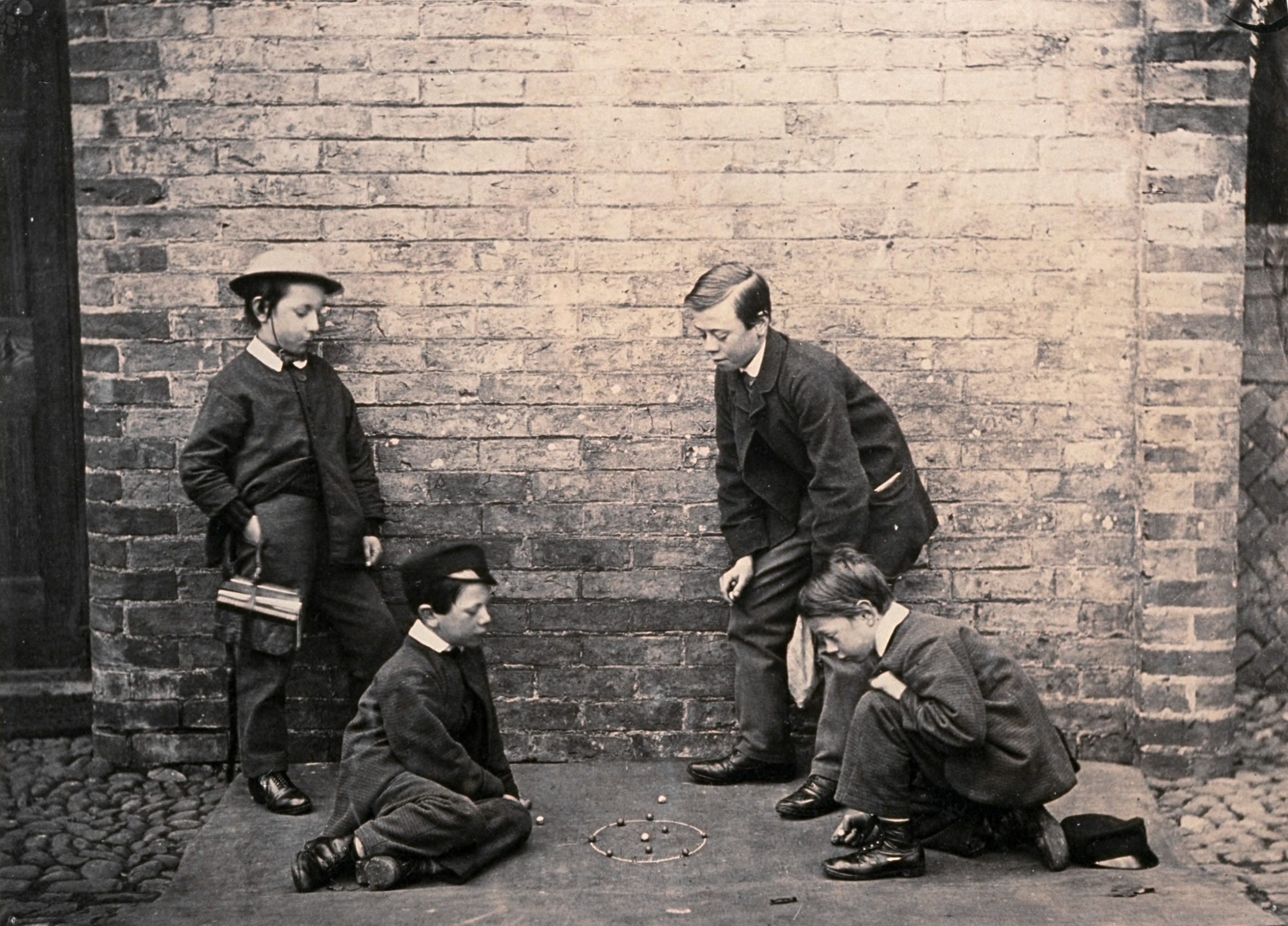 Boys playing marbles